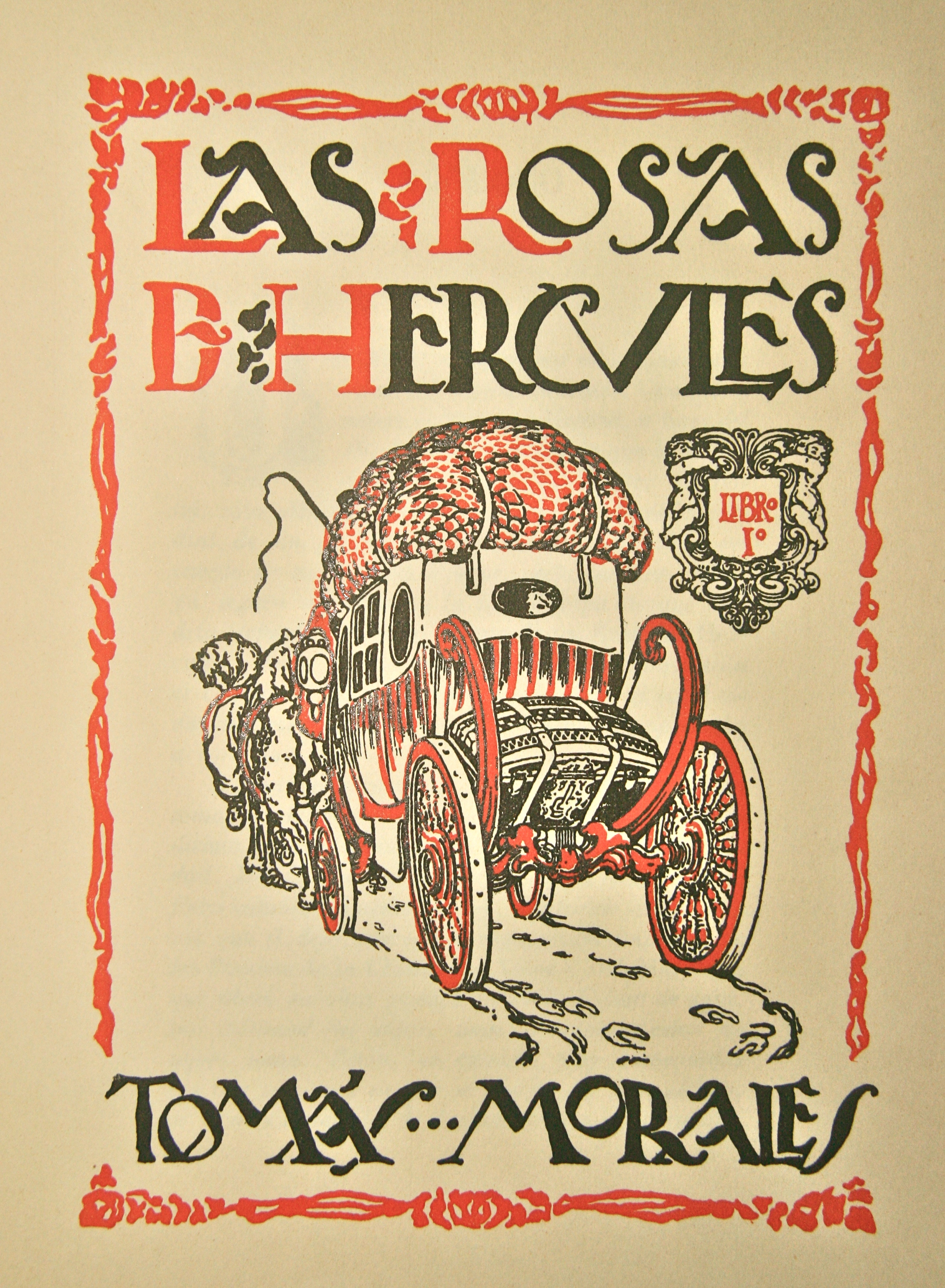 Fotografía de elaboración propia a partir de una portada de libro de 1922, en dominio público.